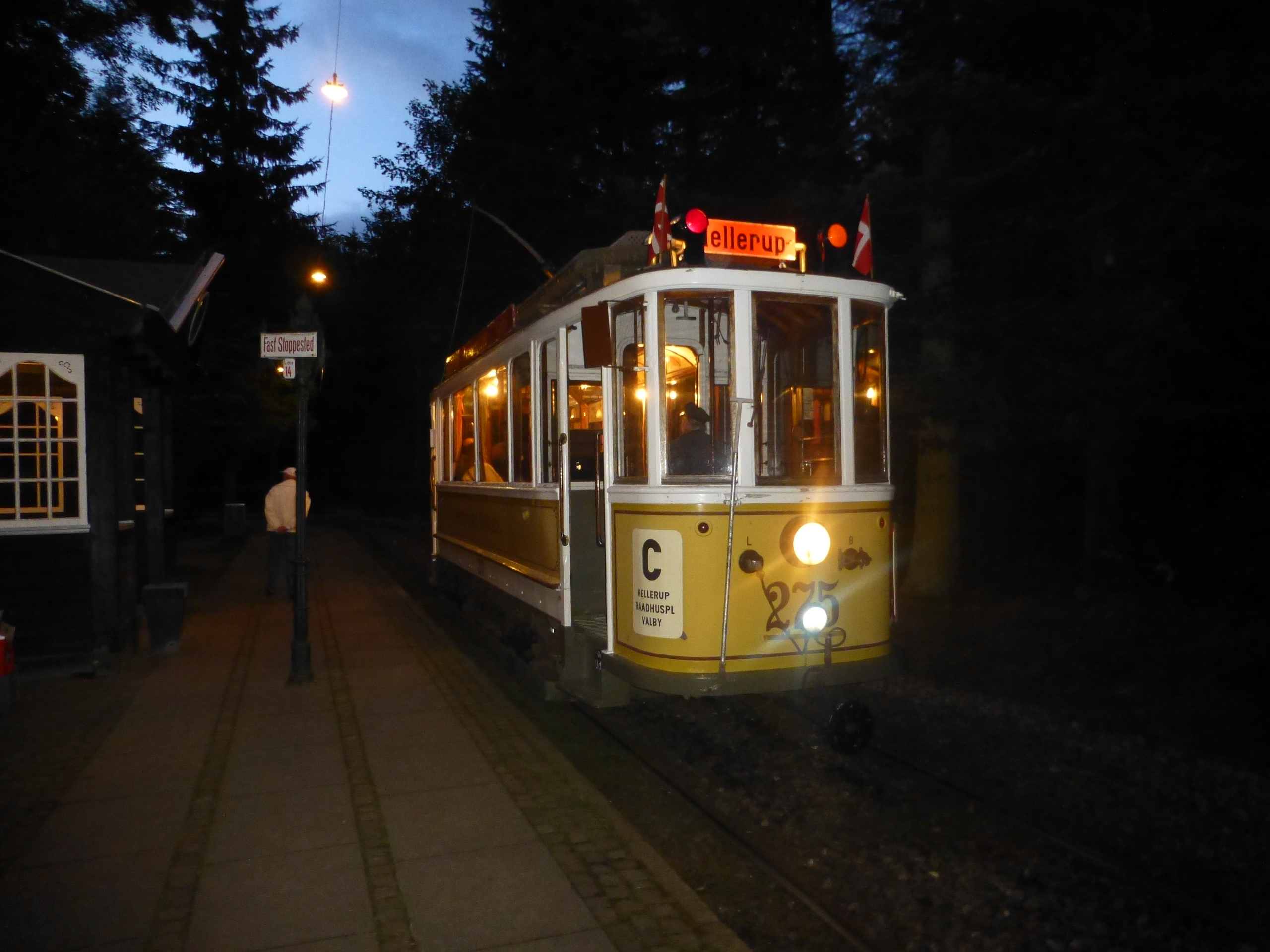 Old tram from Copenhagen KS 275 as night line C at Ejlers Eg on Sporvejsmuseet Skjoldenæsholm in Denmark.